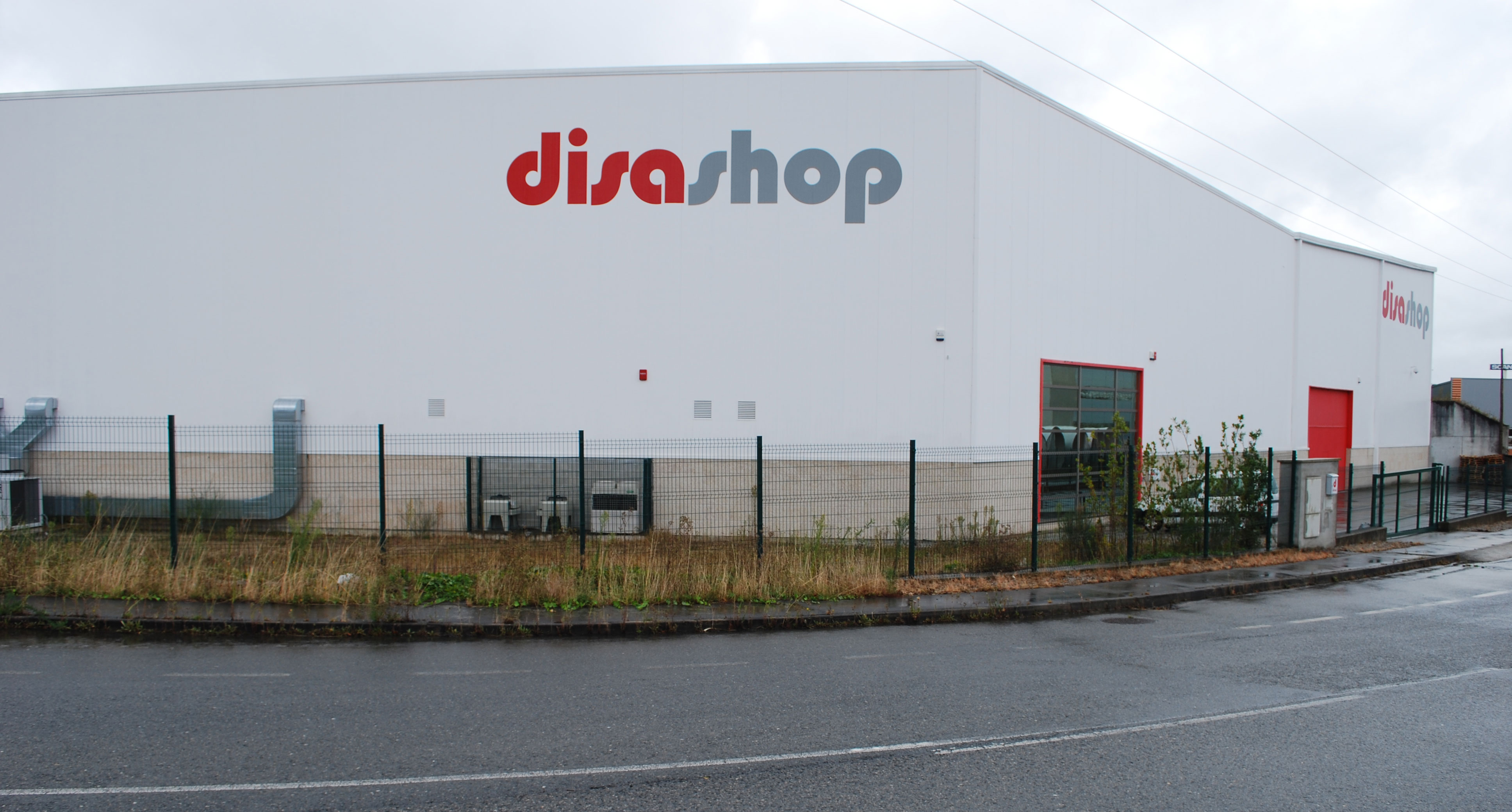 Sede de Disashop no Concello de Coirós, A Coruña Galiza Spain wGL